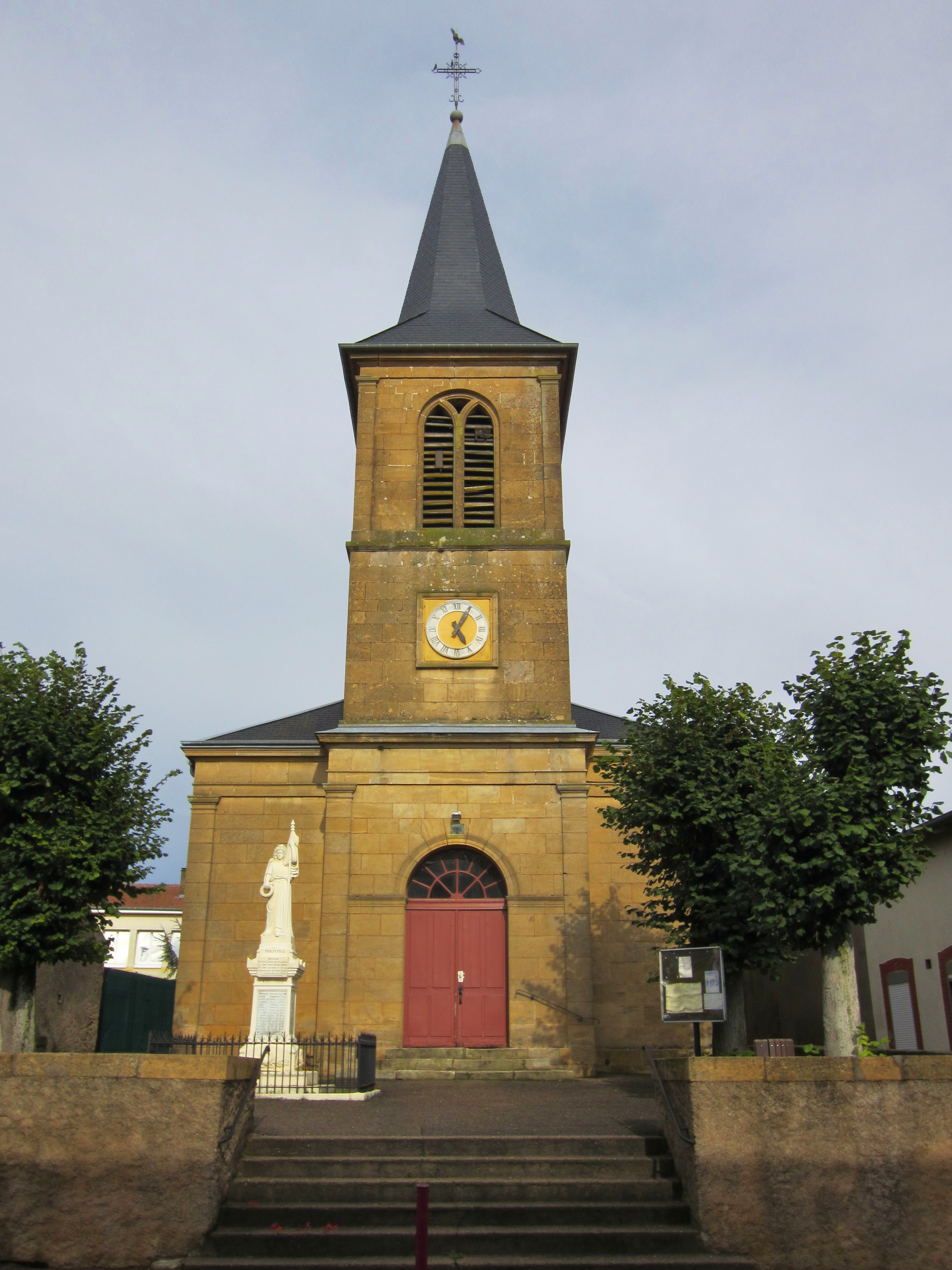 Description eglise Doncourt Conflans eglise Doncourt Conflans